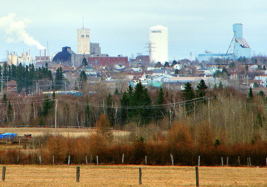 Timmins, Ontario, Canada